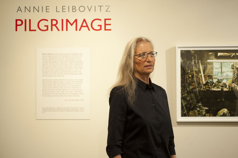 La fotógrafa estadounidense Annie Leibovitz en su exhibición Pilgrimage en el Museo de Concord, Massachusetts.